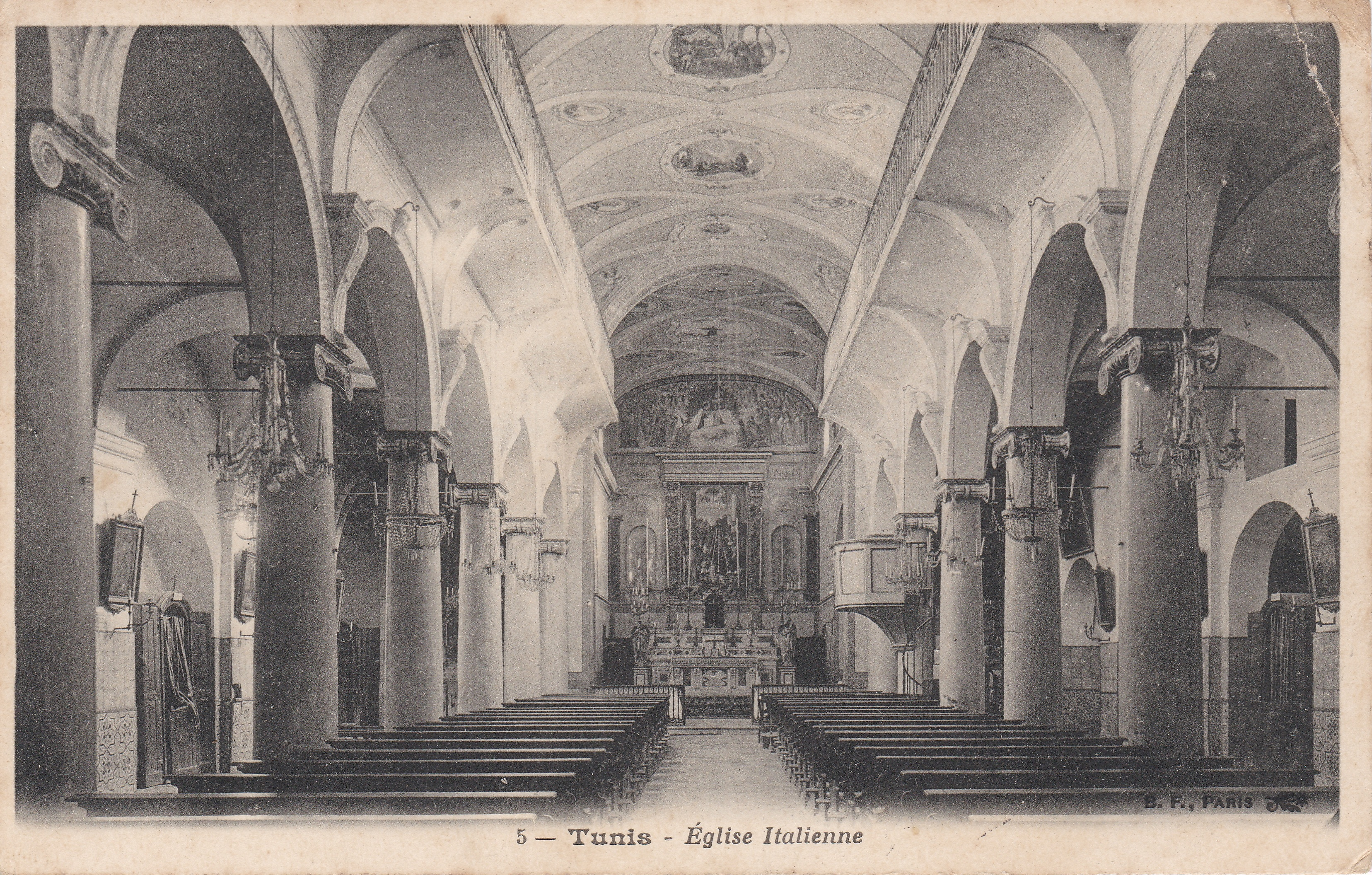 Eglise italienne «Saint-Croix», Médina de Tunis, Tunisie